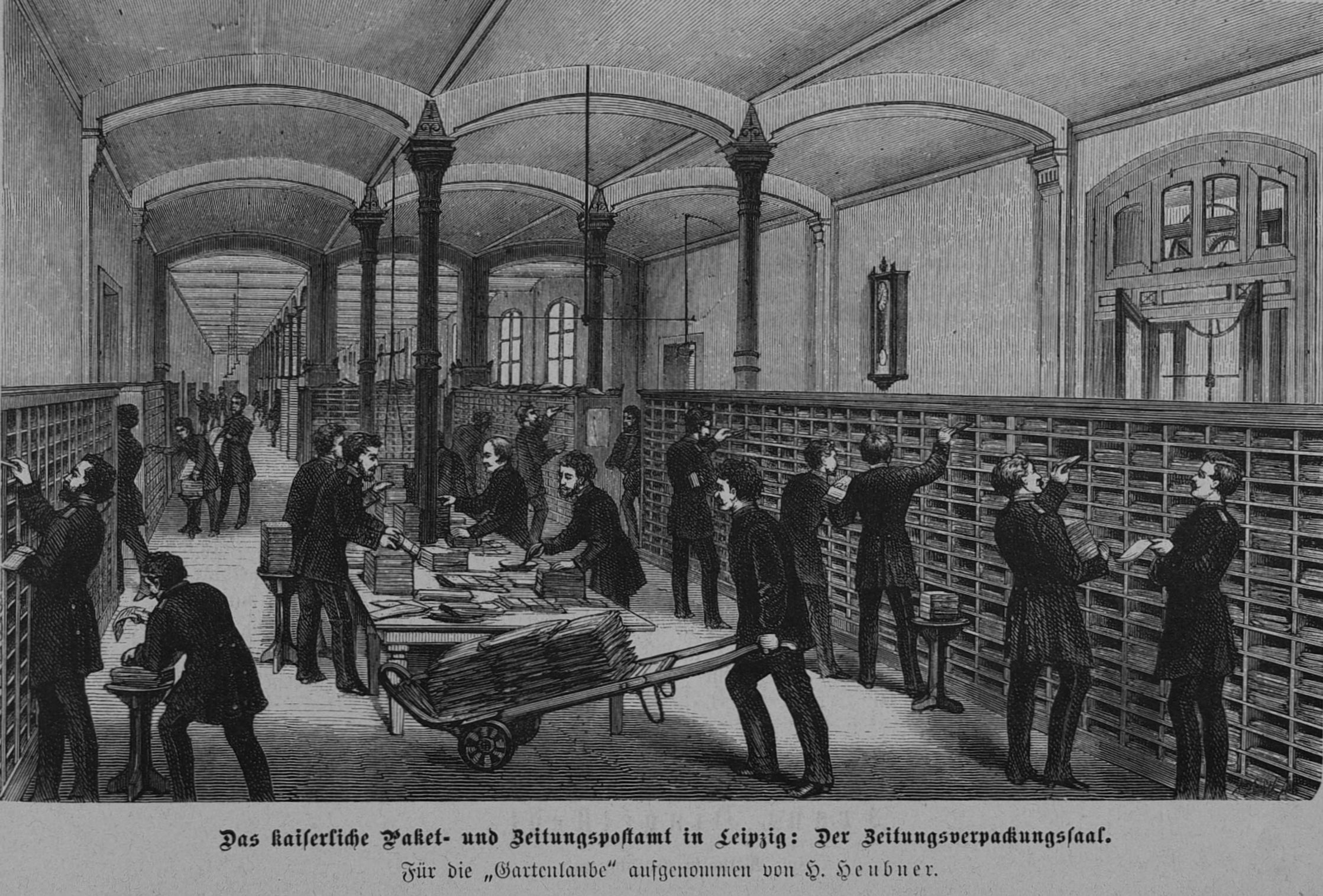 Das kaiserliche Paket- und Zeitungspostamt in Leipzig am Johannisplatz / Prager Straße 4-10, Höhe Grassimuseum, eröffnet am 16. Oktober 1880. Innenansicht Zeitungssortiersaal ("Zeitungsverpackungssaal") im Erdgeschoss des Hauptgebäudes. Stich von Hermann Heubner in "Die Gartenlaube" 1881, S. 413